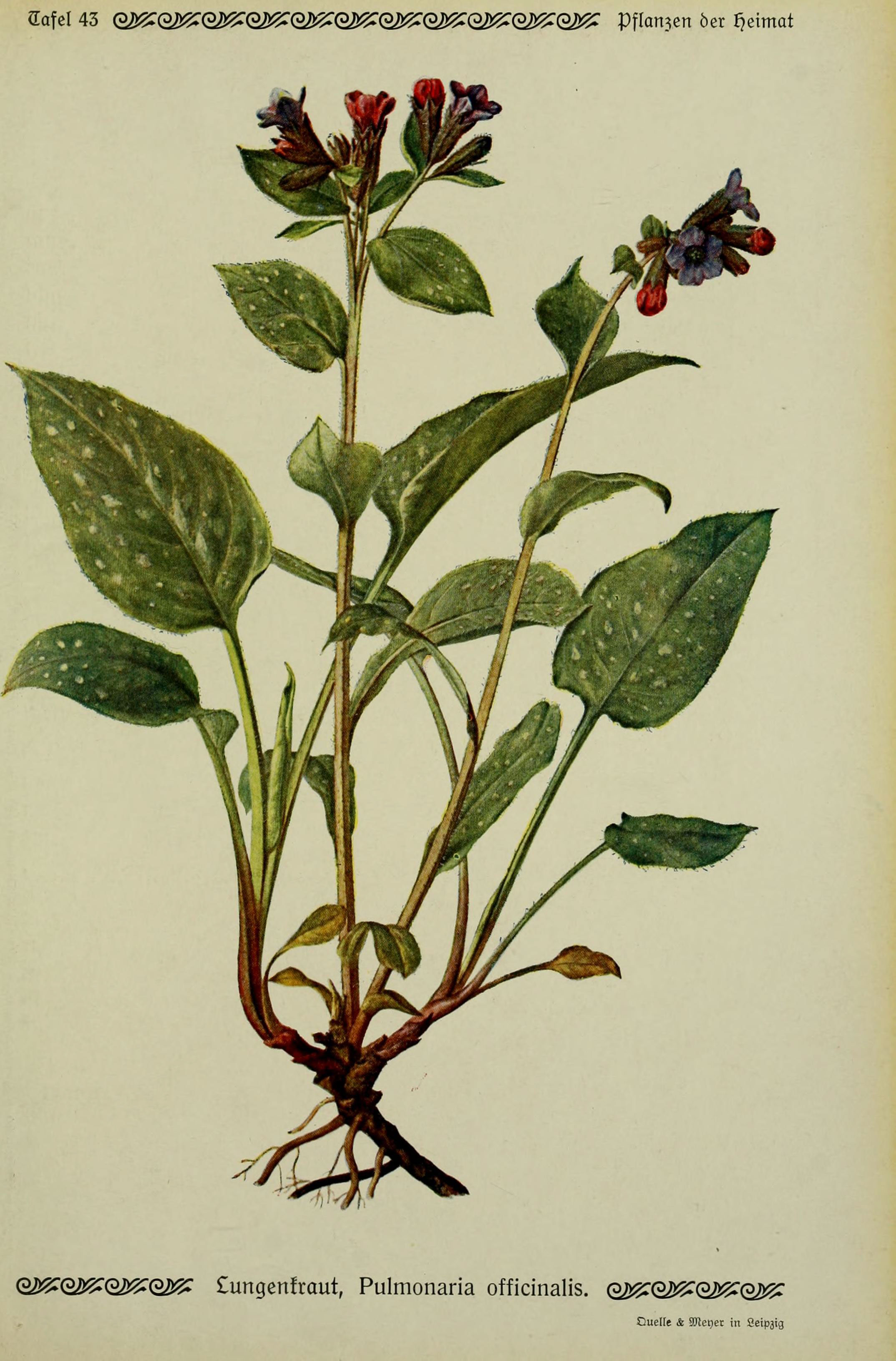 dafcl 43 (22J^G2.!^(E25!^G2i^Q^J^(22J:^(22)^e2)^ Wanden öer ^cimat Gi!5^(2ö!5^(22l!^(2/J^ £ungenfraut, Pulmonaria officinalis. G^(2^Q25^(22^ Duelle & SO!et)et in Seipjig